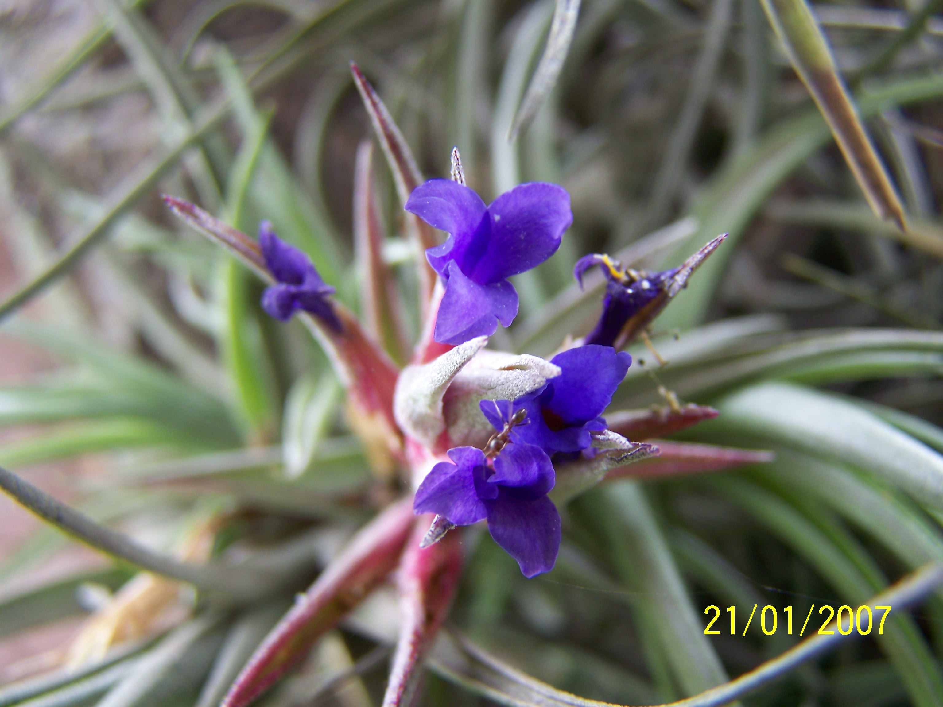 clavel del aire